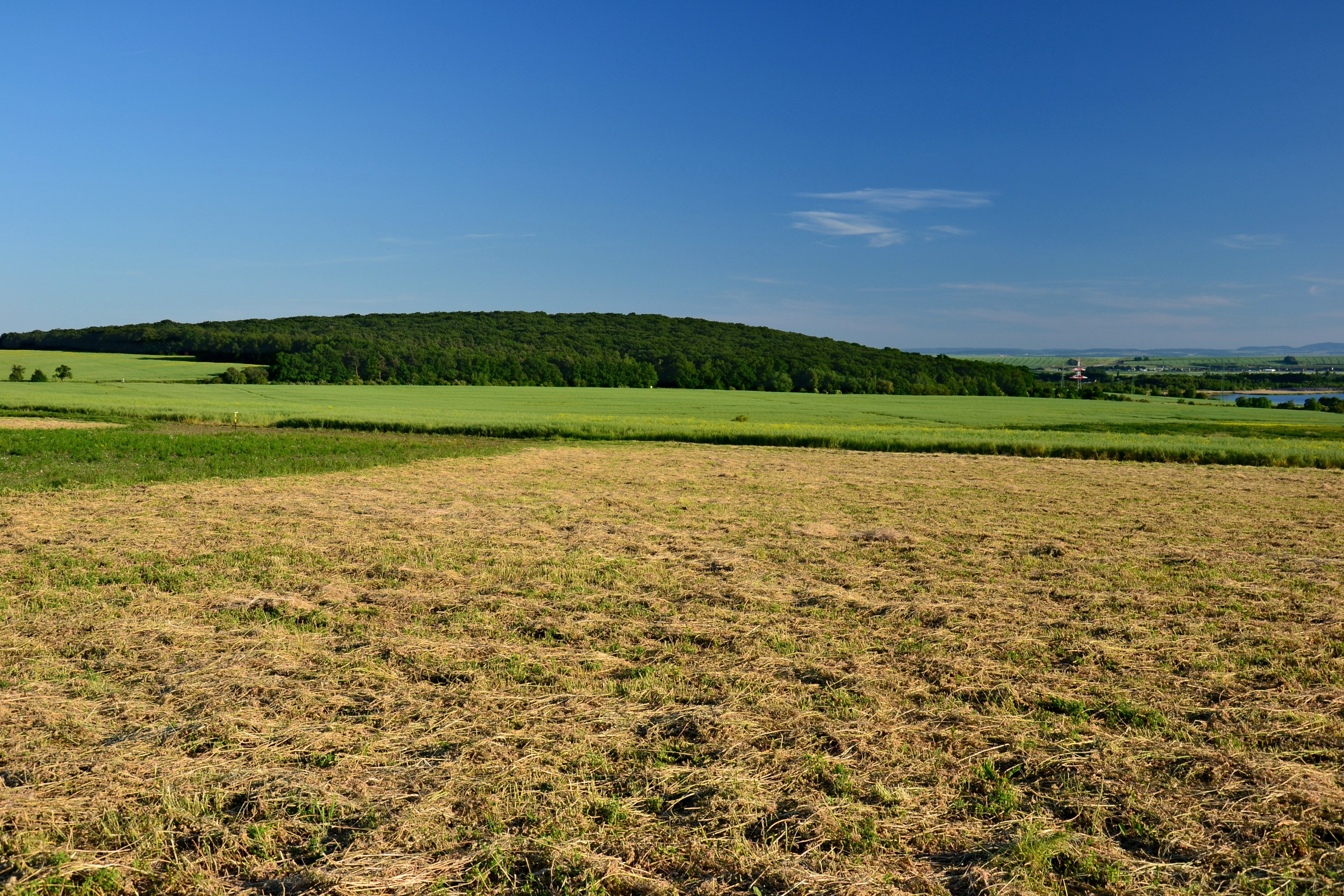 Celkový pohled na Údlické doubí od Michanického remízu